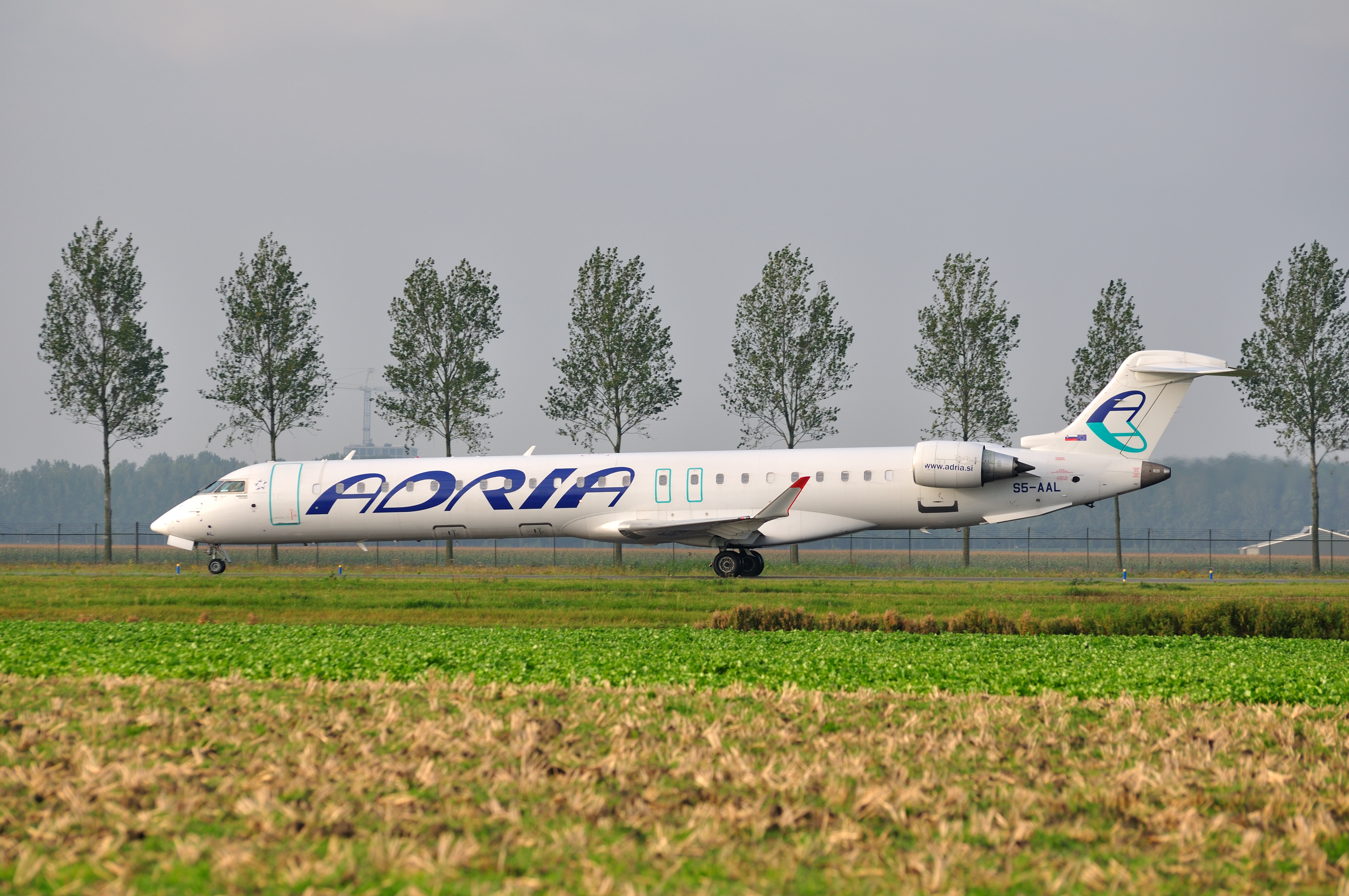 Adria Airlines (Slovenia) Canadair CRJ-900 reg. S5-AAL